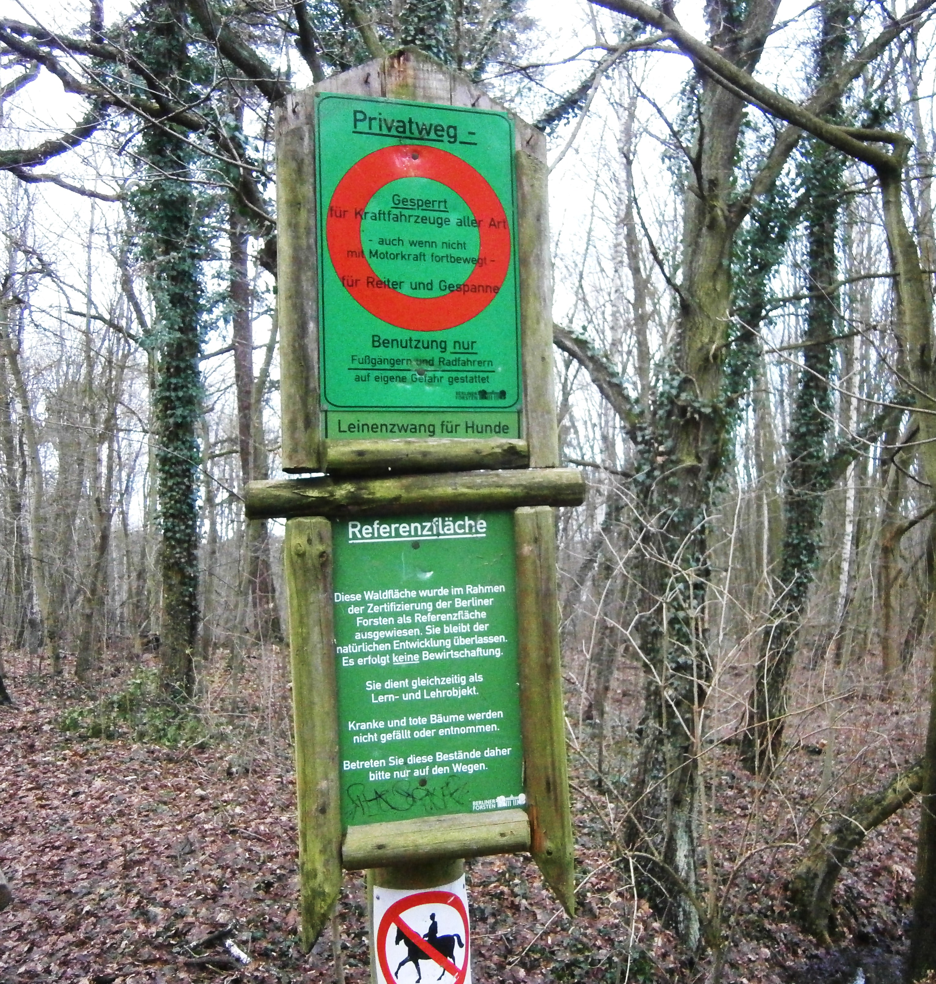 Hubertusweg ist eine Straße im Ortsteil Frohnau von Berlin, hier die beschreibenden Schilder der Fläche des Waldgeländes Frohnau als Referenzfläche der Berliner Forstverwaltung und der Strsßen und Wege als Privatstraßen. Diese Aufstellung befindet sich am östlichen Ende des Hubertuswegs von Brandenburg her, am Tripelpunkt Berlin-Frohnau, Schönfließ (Mühlenbecker Land) und Hohen Neuendorf.